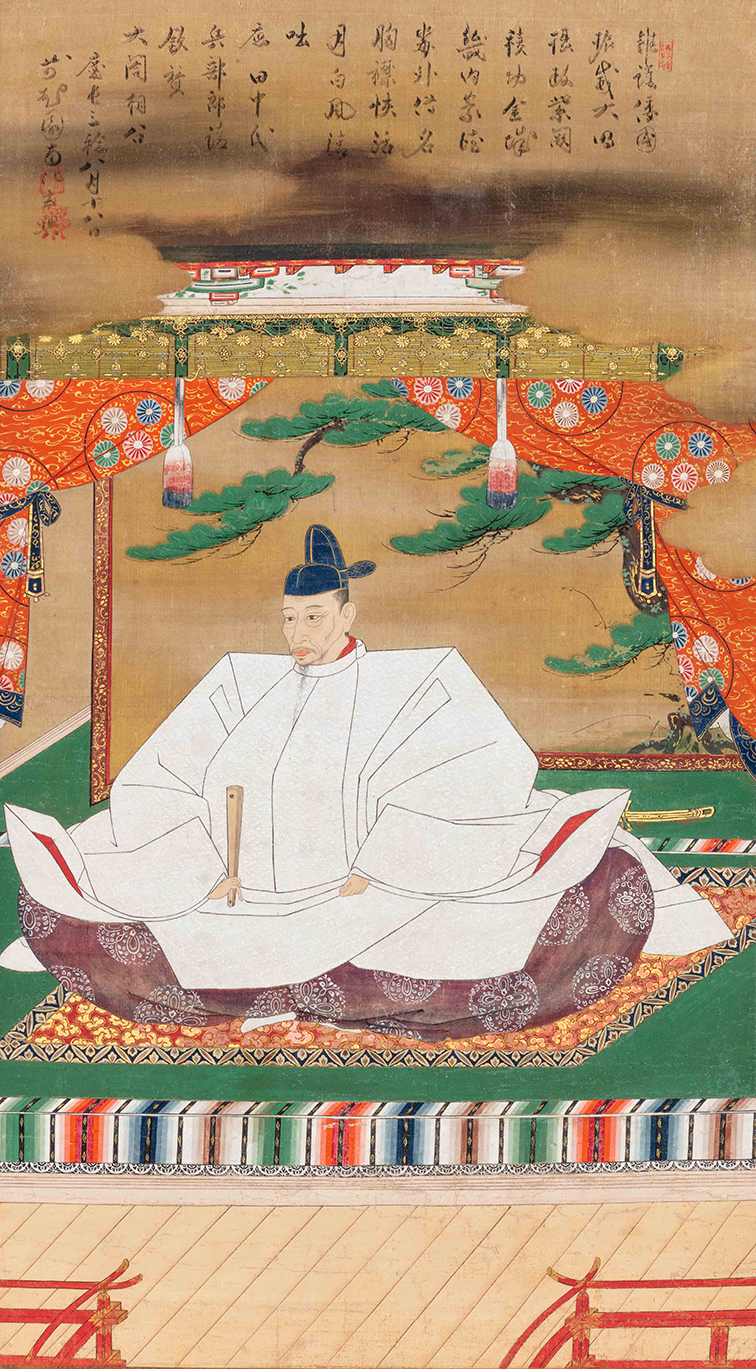 Toyotomi Hideyoshi